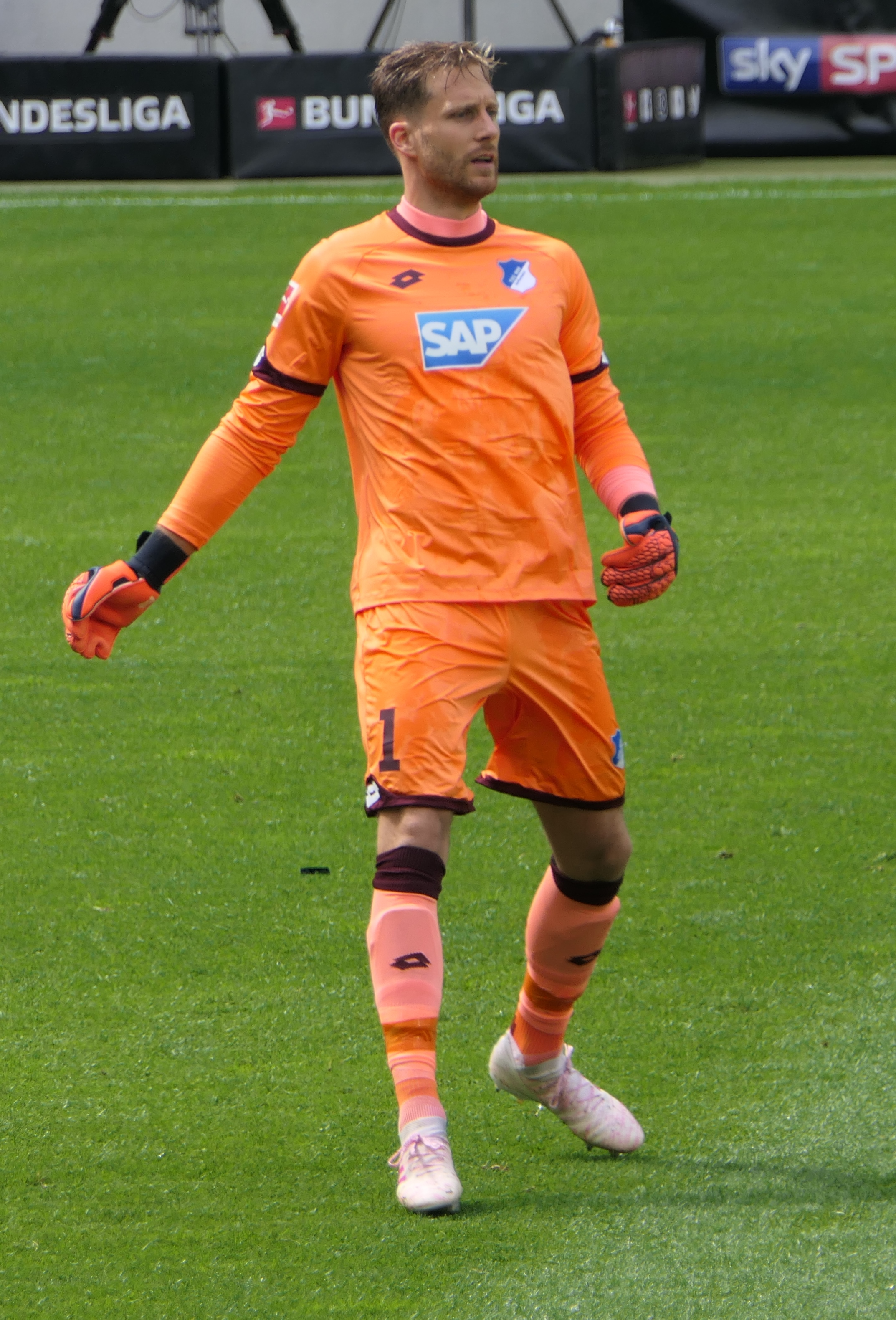 Der Fussballprofi Oliver Baumann im Trikot der TSG 1899 Hoffenheim beim Heimspiel gegen den SV Werder Bremen am 11.05.2019.